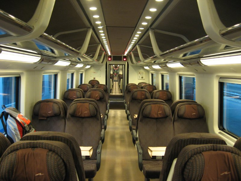 Interno di un ETR 480.